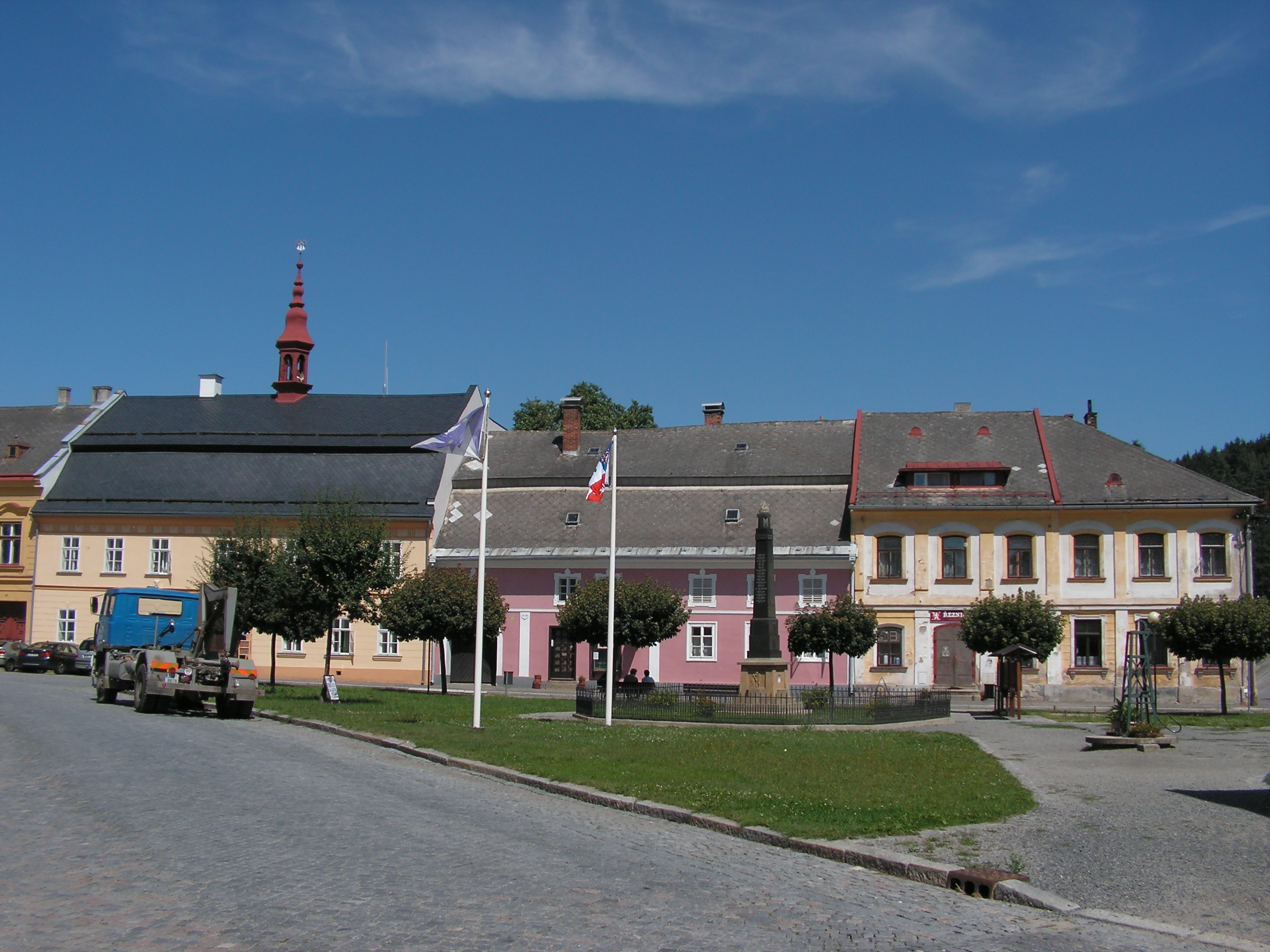 Jimramov - náměstí Jana Karafiáta